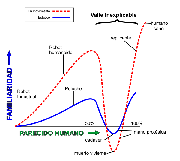 Gráfica de la teoría del Valle Inexplicable de Masahiro Mori. Remasterizada por Edgar Talamantes